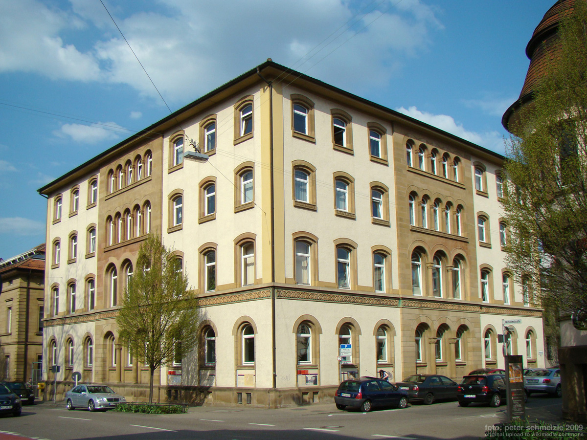 Wilhelmsbau (Wilhelmstr. 9) in Heilbronn